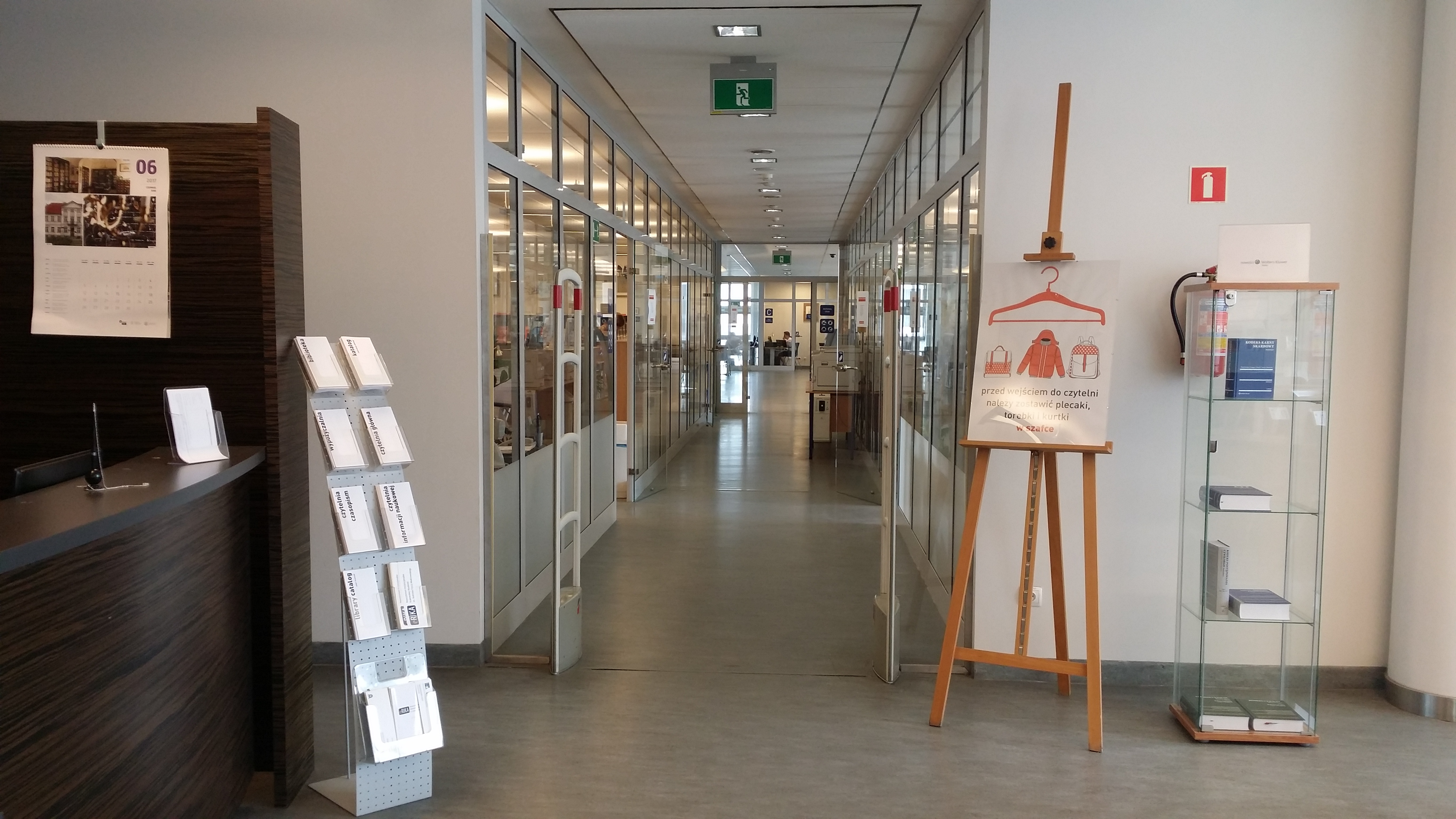 Biblioteka Krakowskiej Akademii im. Andrzeja Frycza Modrzewskiego